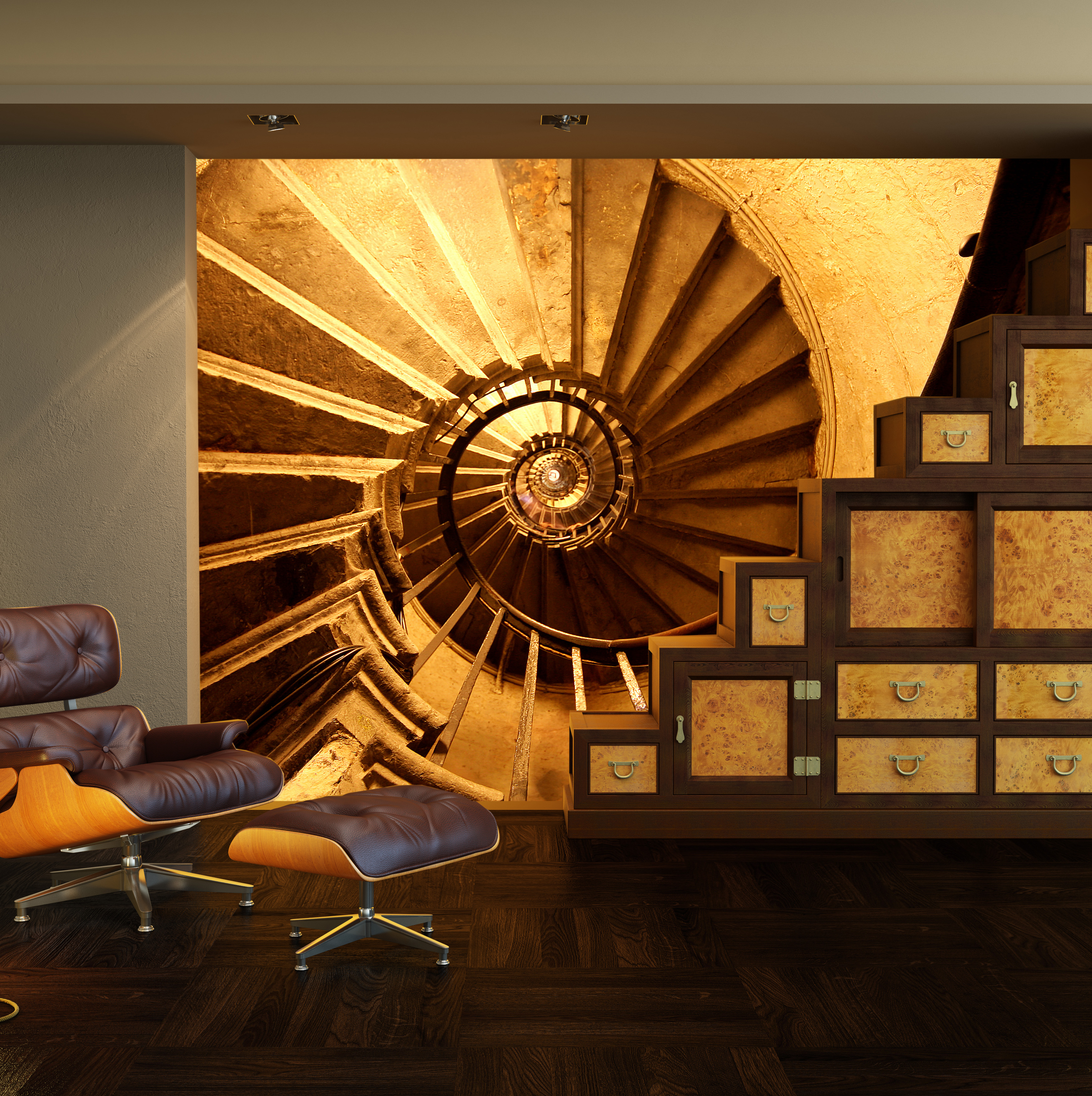 Фотообои расширяющие пространство